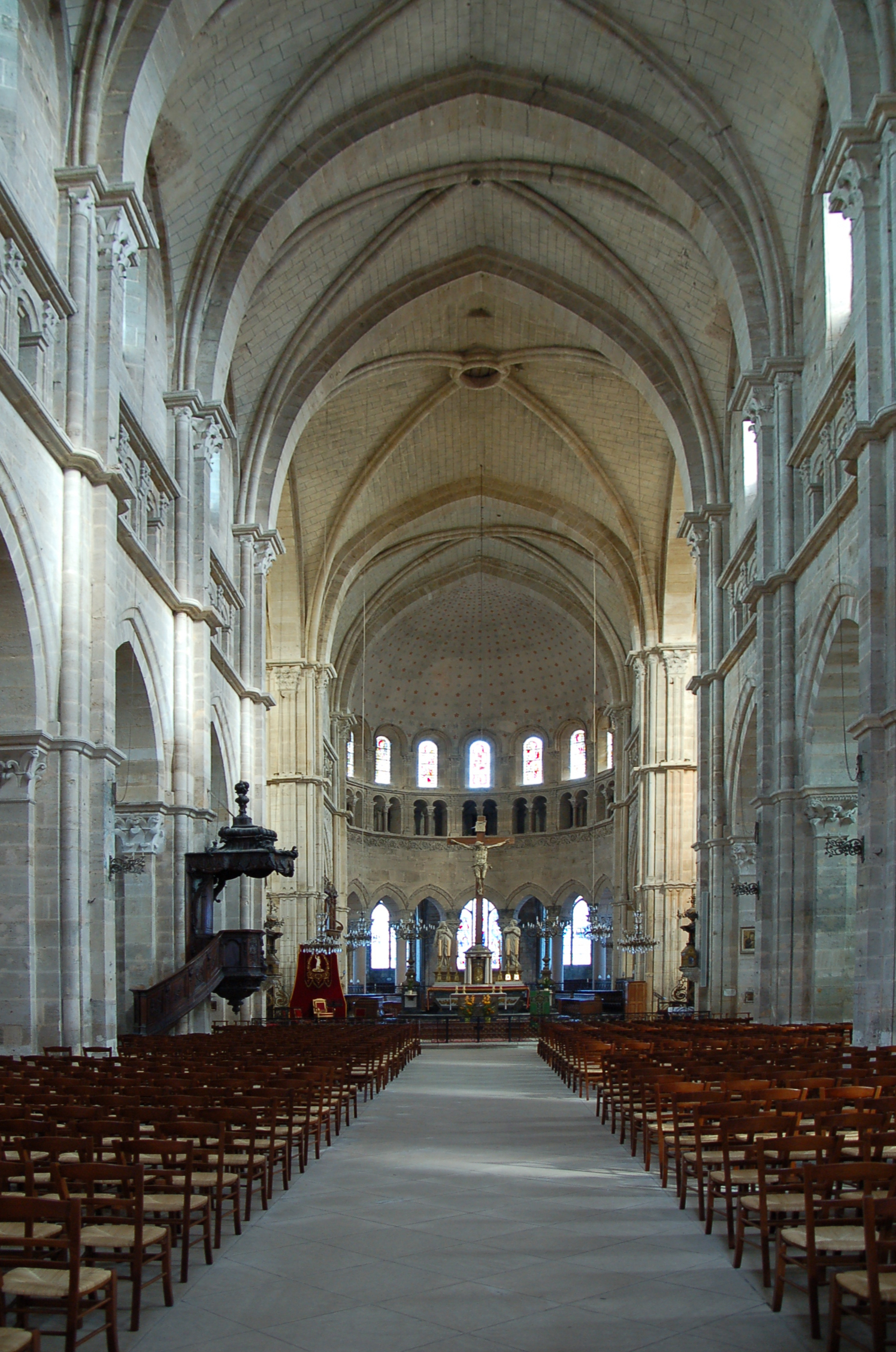 Kirchenschiff der Kathedrale von Langres